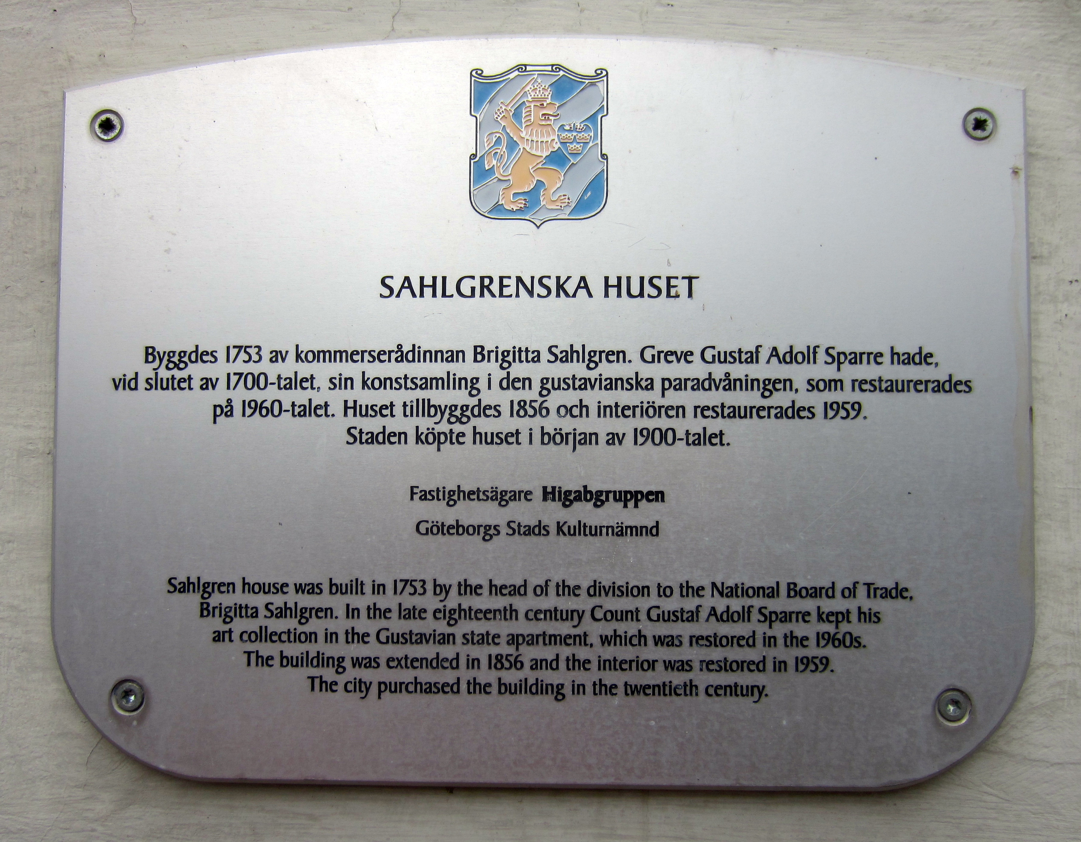 Sahlgrenska huset - plakett. Plaketten sattes upp som en del av Göteborgs stads kulturnämnds "Projekt Husmärkning" kring åren 2000-2001 där drygt etthundra skyltar ingick. Se även boken "100 utmärkta hus i Göteborg". Vid en inventering av kommunen gjord 2016 satt 69 skyltar fortfarande uppe.